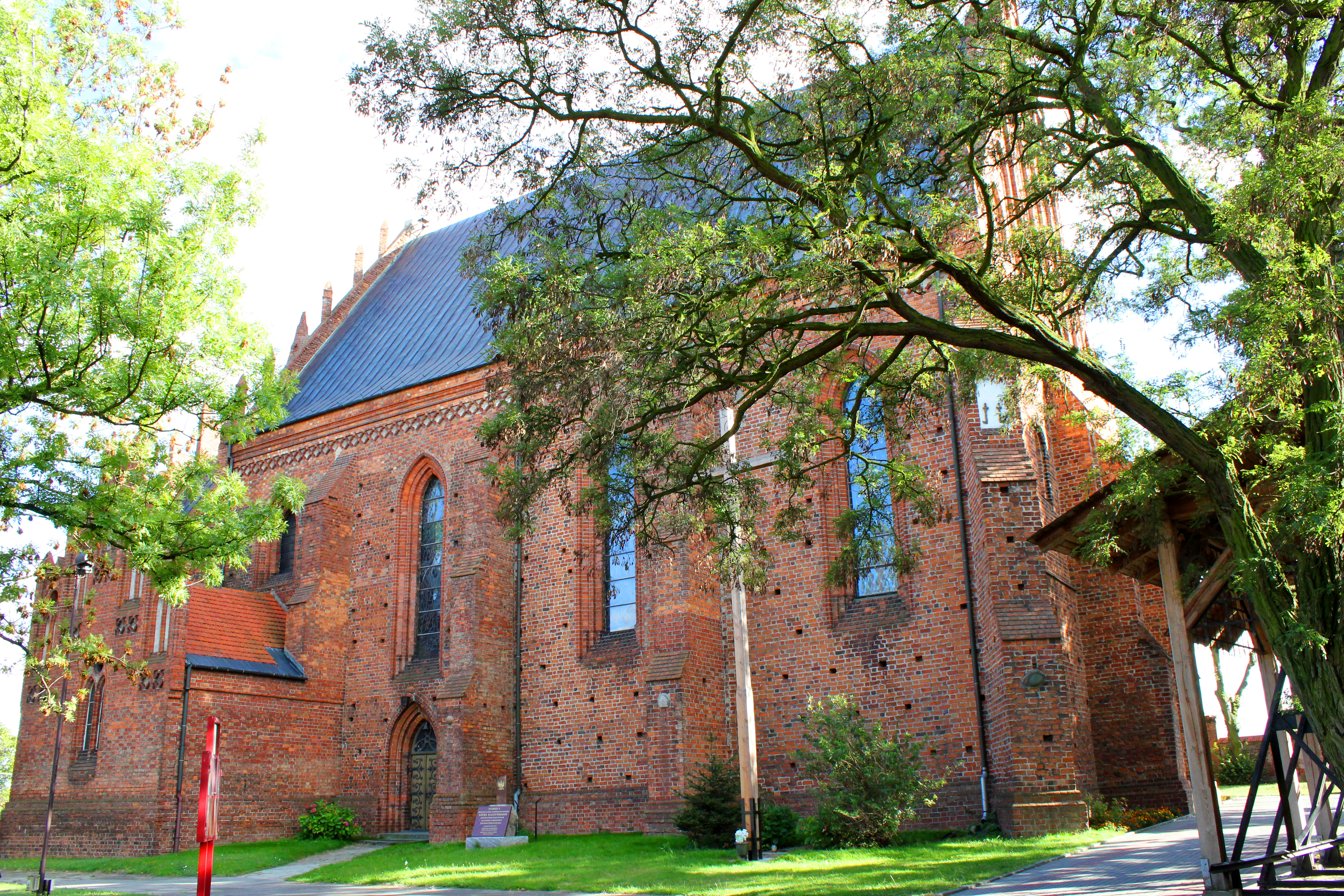 Brześć Kujawski - kościół parafialny p.w. św. Stanisława, XIII, 1909